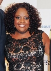 Sept. 2013 Maj. Gen. Nadja West was honored with the Armed Forces Medical Advocate Award from Essence Magazine and Southern Company in Washington, DC. Here, West is with other honorees: Dr. Jesse J. Lewis, Sherri Shepherd, and Sophia Marnell.Photo by: Aaron J. Thornton/Essence